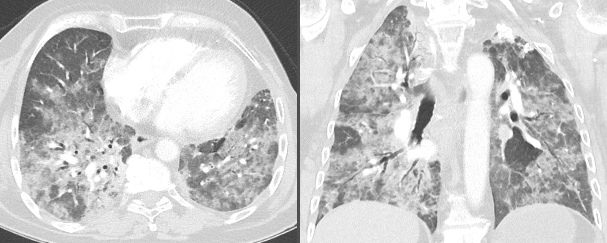 Schwere Pneumonitis nach Everolimus-Therapie. Computertomographie axial und coronar.